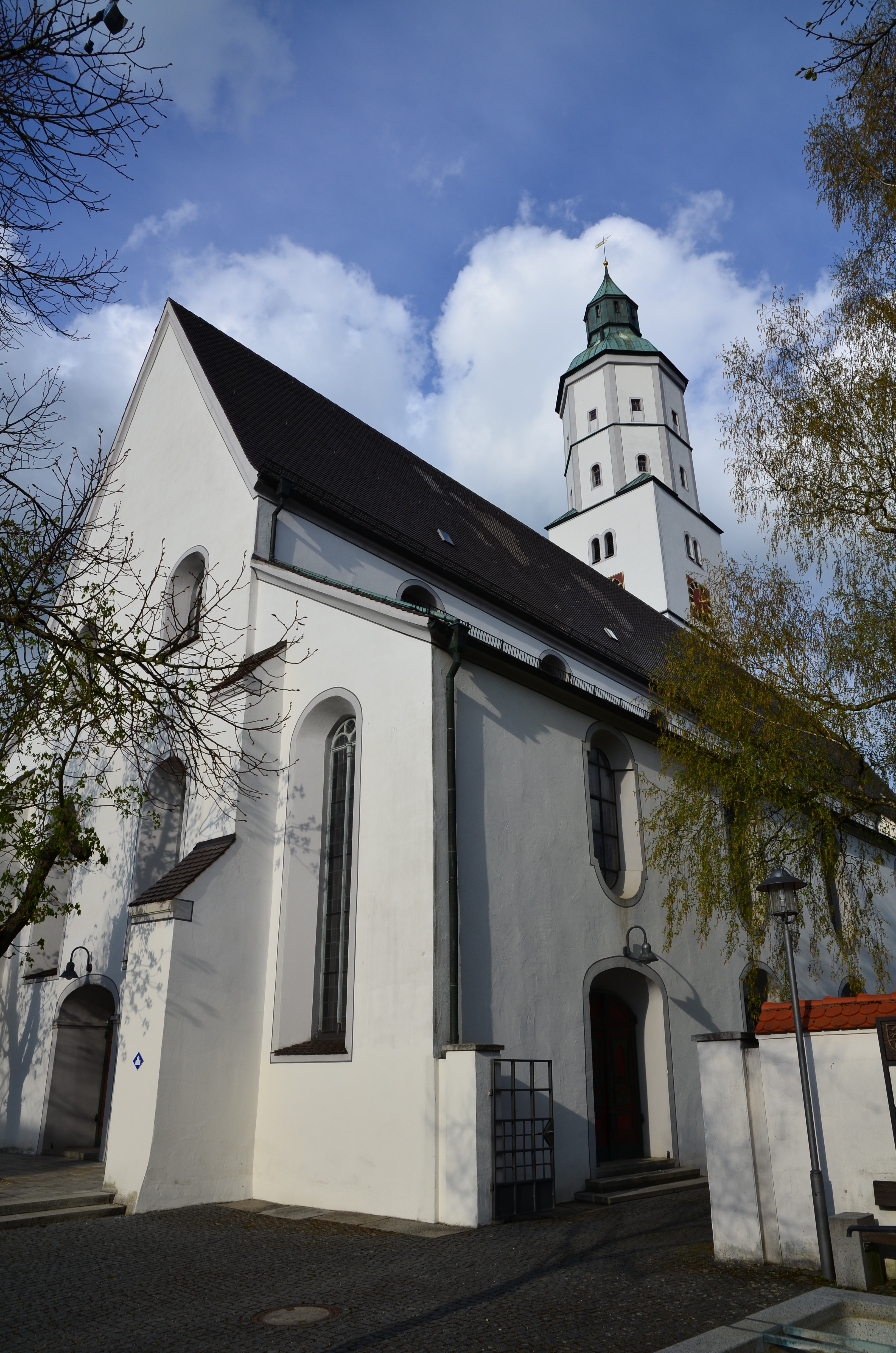 Evangelische Stadtpfarrkirche St. Martin in Langenau